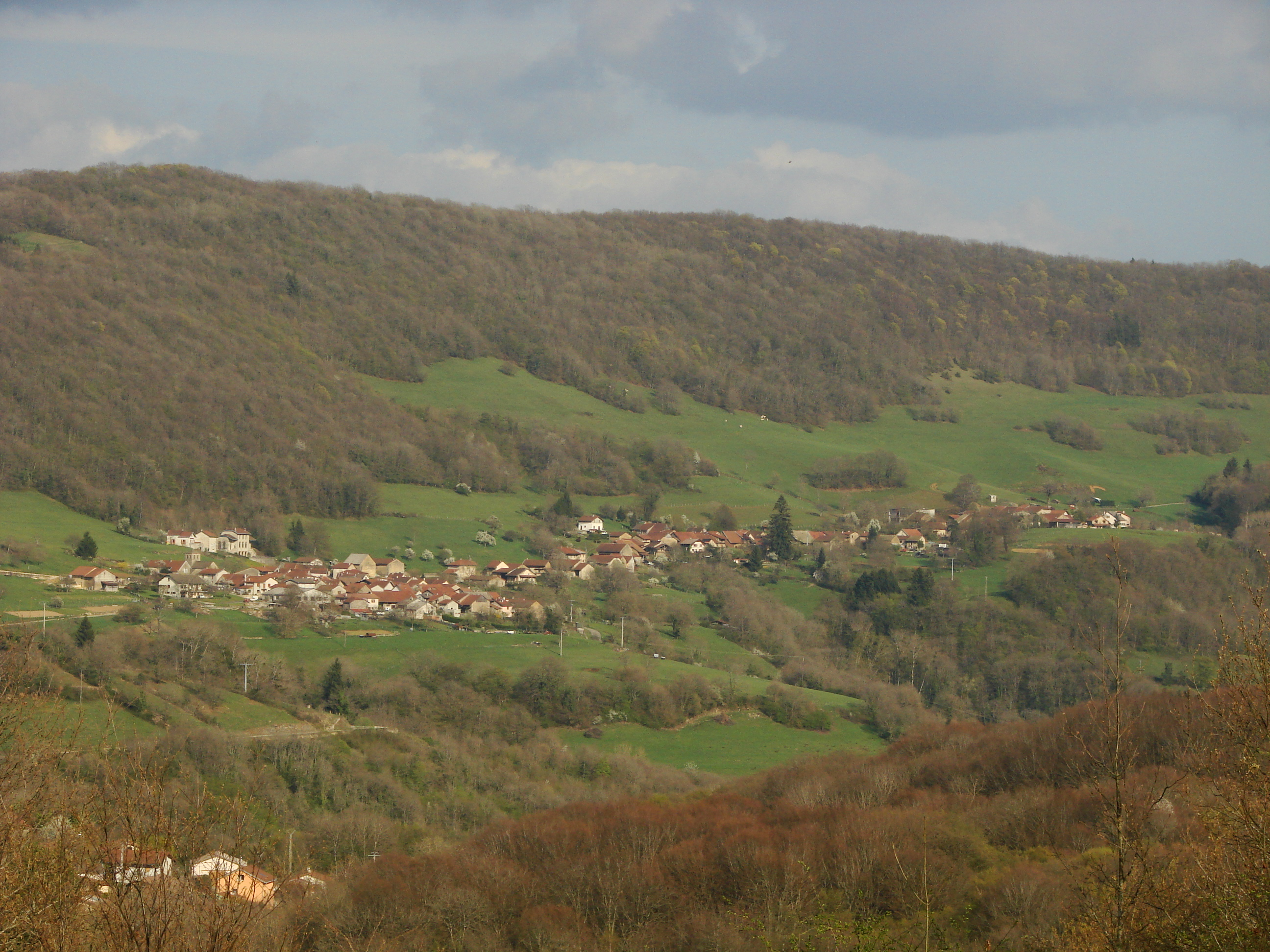 Vue de Cleyzieu